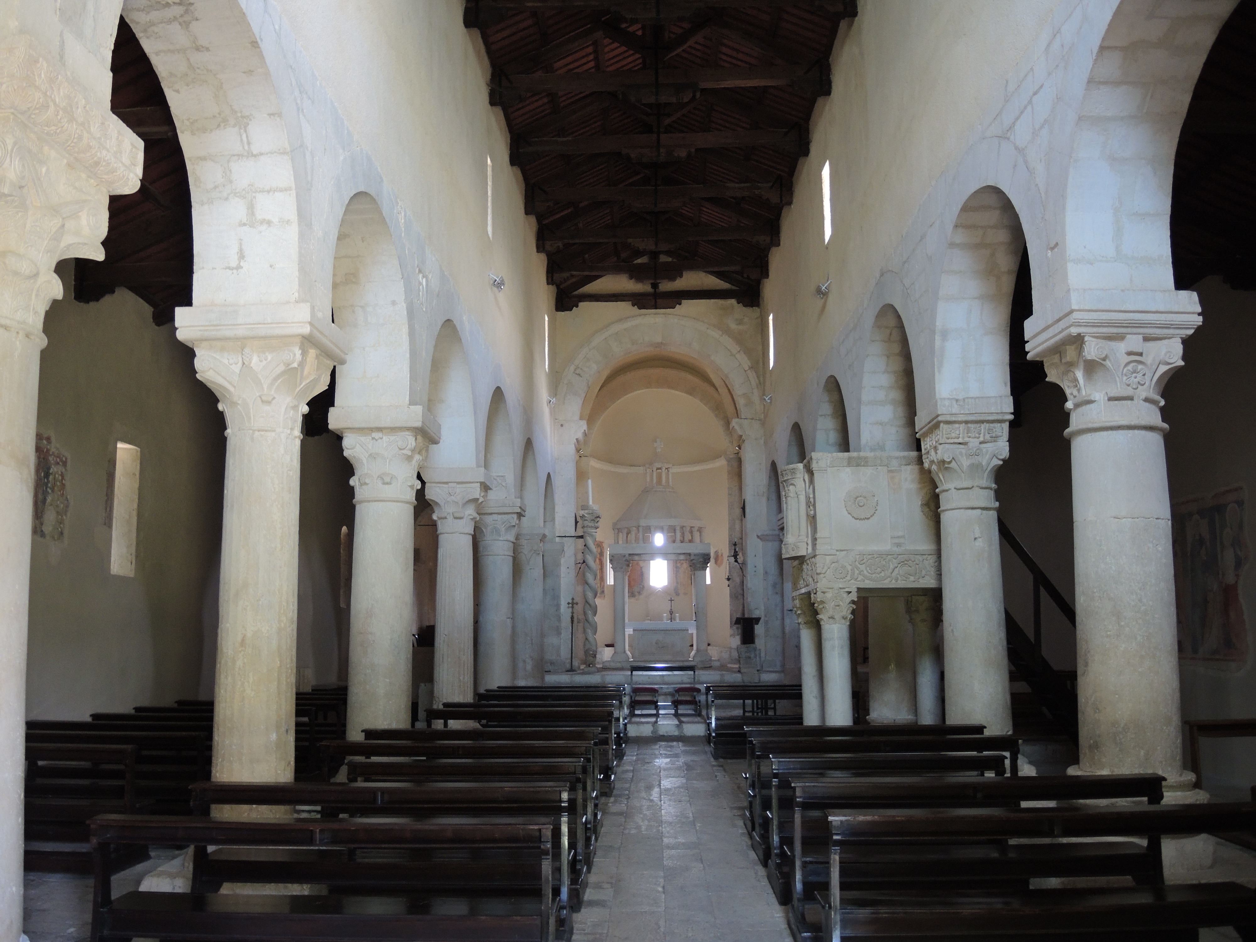 Bominaco: Abbazia di Santa Maria Assunta